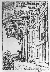 小泉成一《平軍南都ニ乱入ス》の作者による描きおこし図版